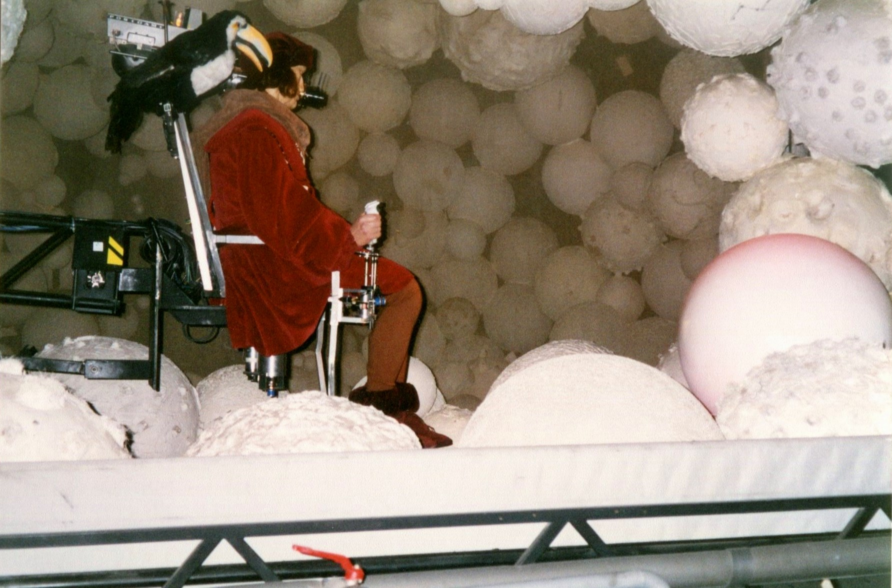 FuturoscopeChristopheC